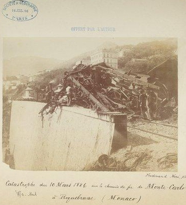 collision sur la voie unique entre deux trains de sens contraire